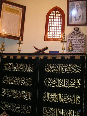 foto del maqam (tumba) del Shayj al-alawi en Mostagán